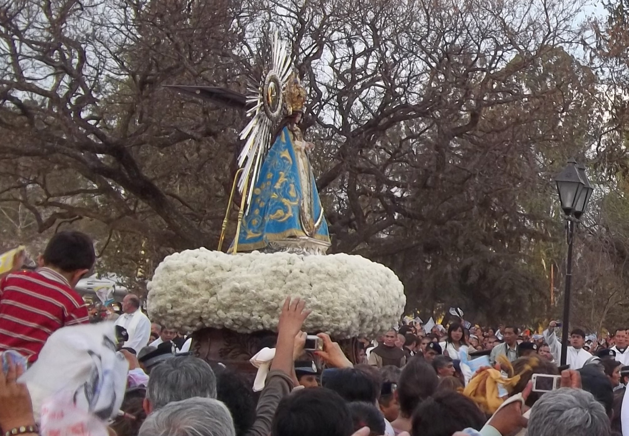 Virgen del Milagro, Salta, Argentina.